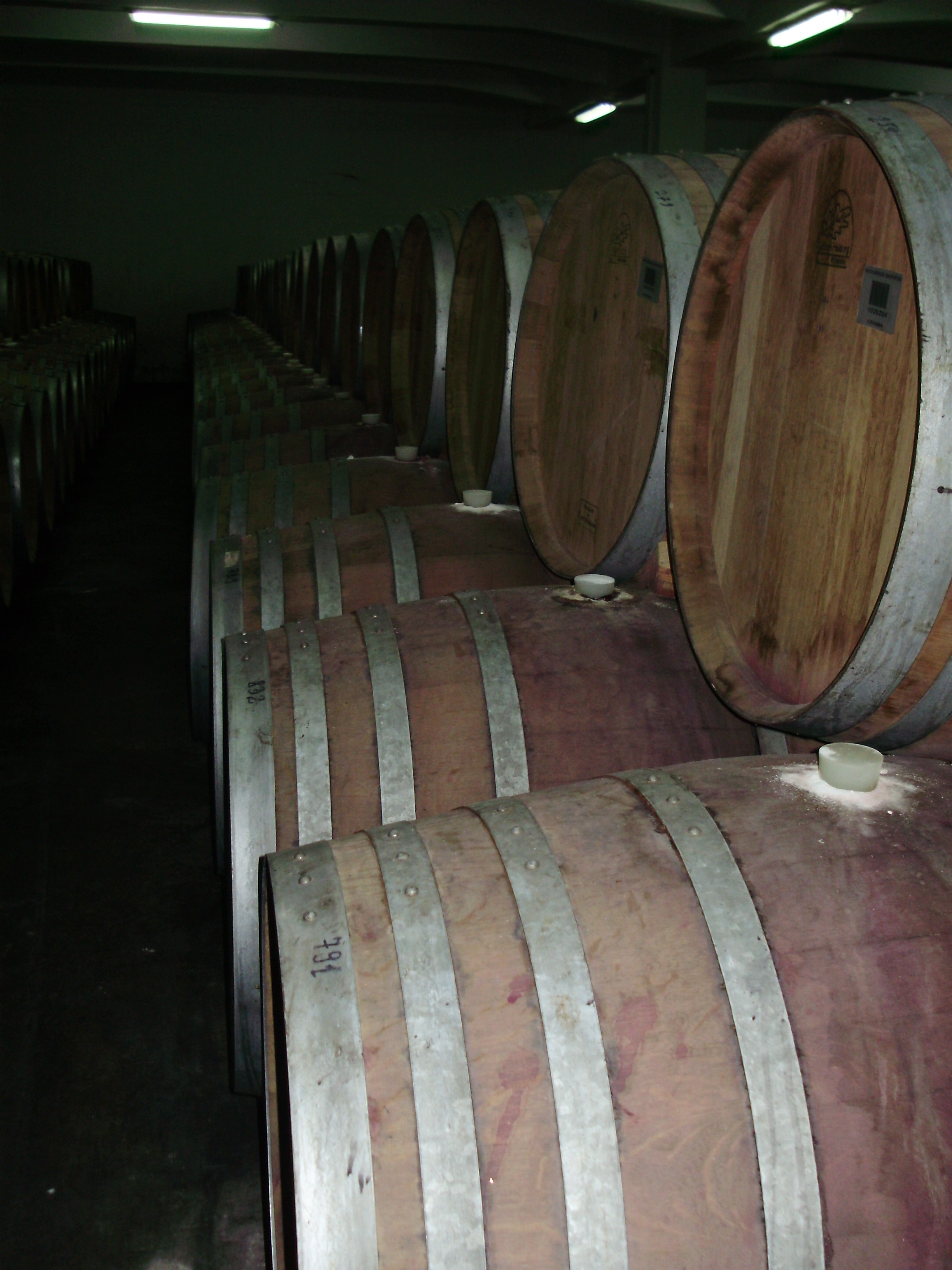 Maturarea vinului în barrique de stejar